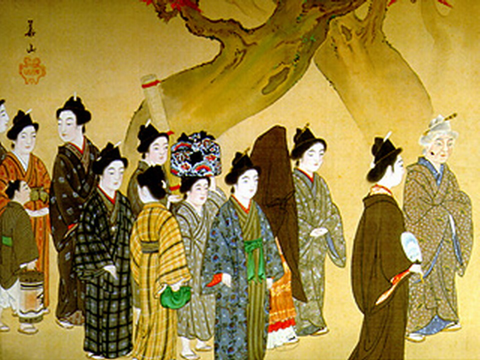 比嘉華山筆『婚姻風俗図』部分拡大